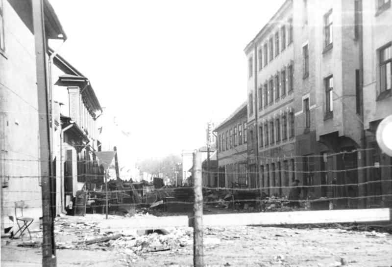 ADN-ZB/Donath II. Weltkrieg 1939 - 1945 Judenverfolgung durch die faschistischen deutschen Besatzungstruppen in der Sowjetunion. Lettische SSR: Das Judenghetto in Riga. Aufn. 1942